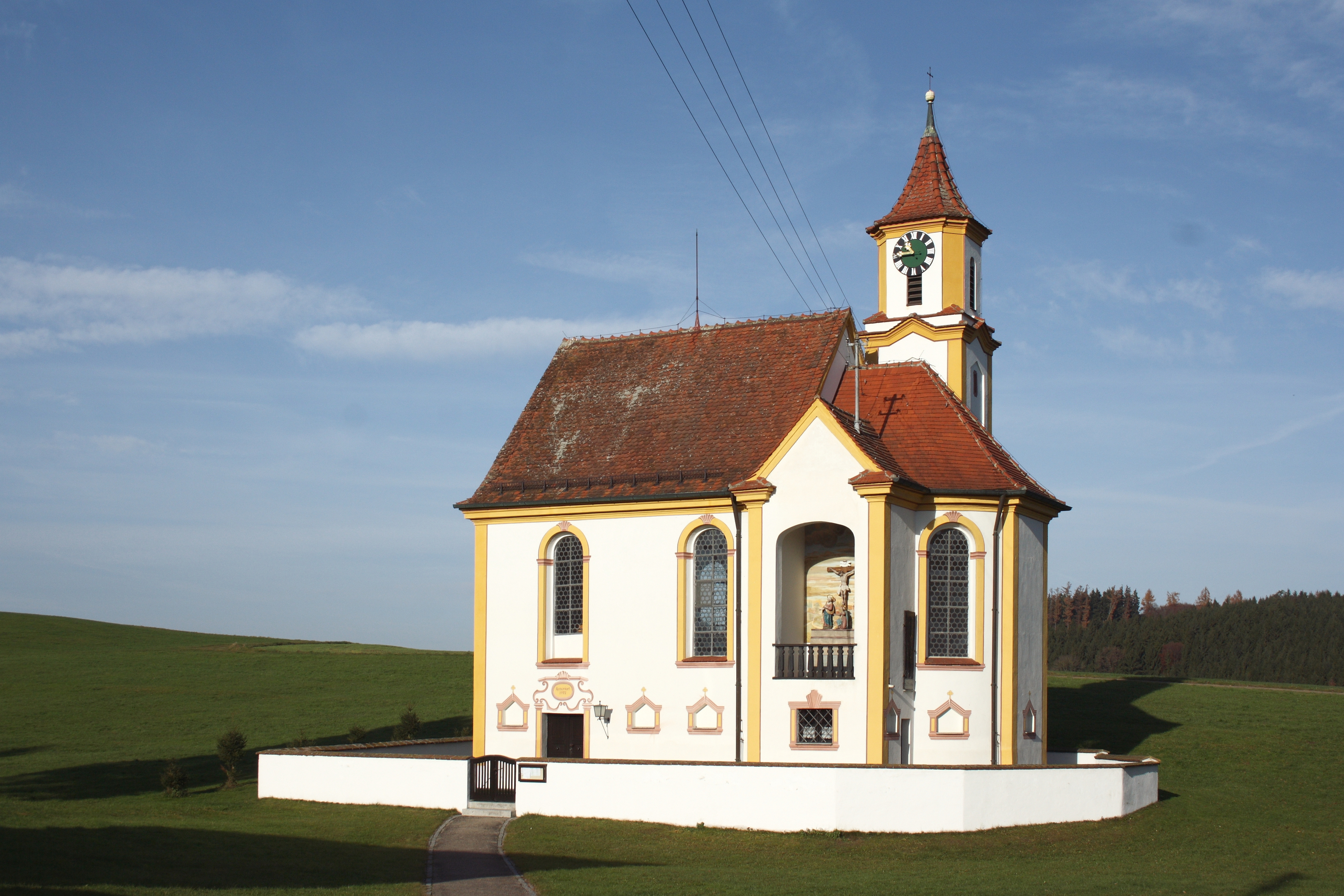 Katholische Kapelle St. Maria Magdalena in Eichenhofen, einem Ortsteil von Haldenwang im Landkreis Günzburg (Bayern)